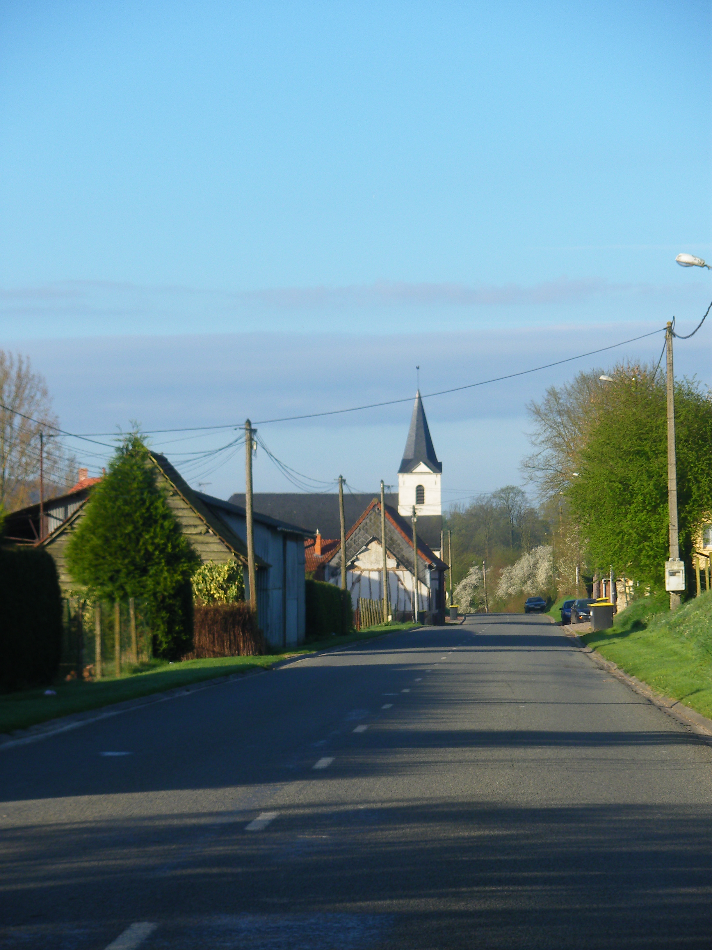 Vue de Warlincourt-lès-Pas.